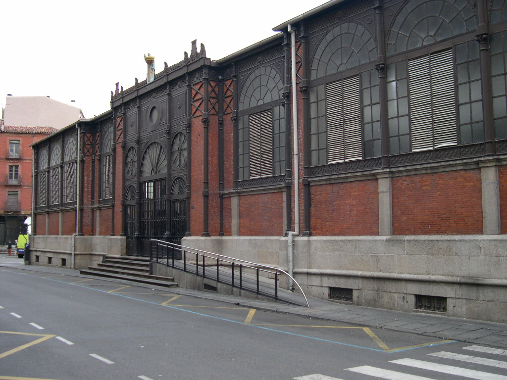 Fachada frontal del Mercado Central de Abastos de Salamanca a cargo del constructor Moneo y el arquitecto D. Joaquín de Vargas. Edificio inagurado en 1909.